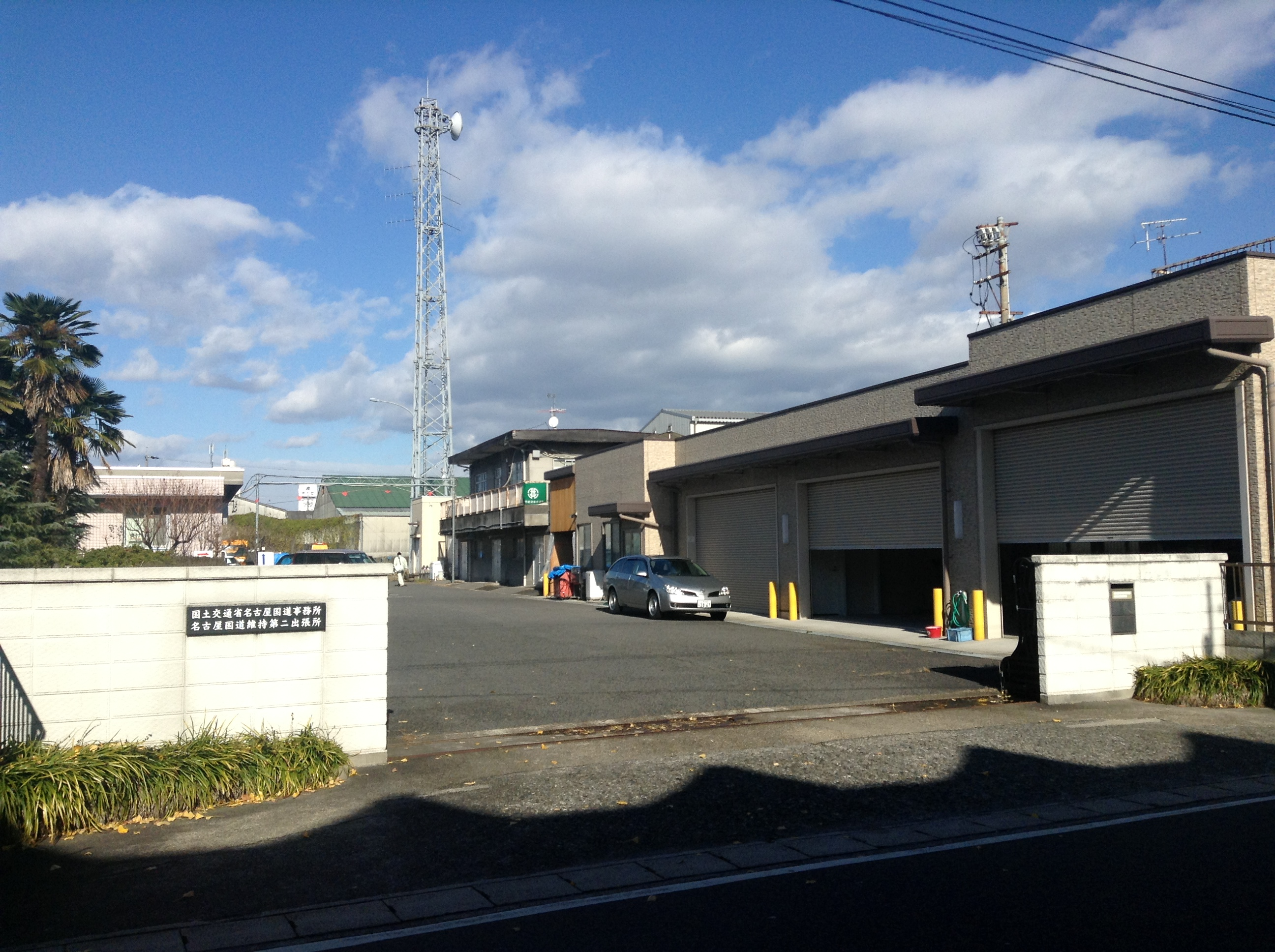 愛知県春日井市西本町にある国土交通省名古屋国道維持第二出張所を南側から写す。